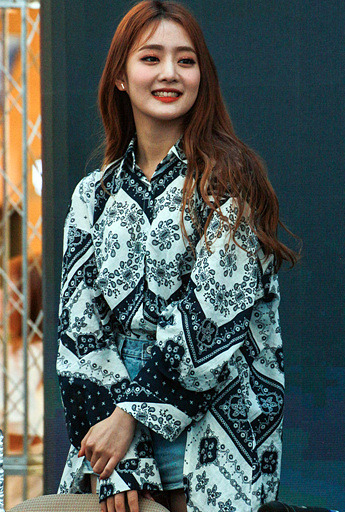 6월 2일 (여자)아이들 팬사인회